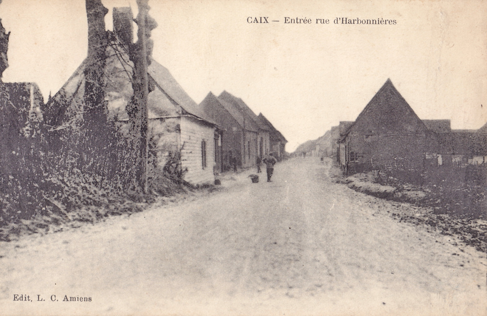 Carte postale ancienne éditée par LC (Léon Caron) à Amiens : CAIX - Entrée rue d'Harbonnières